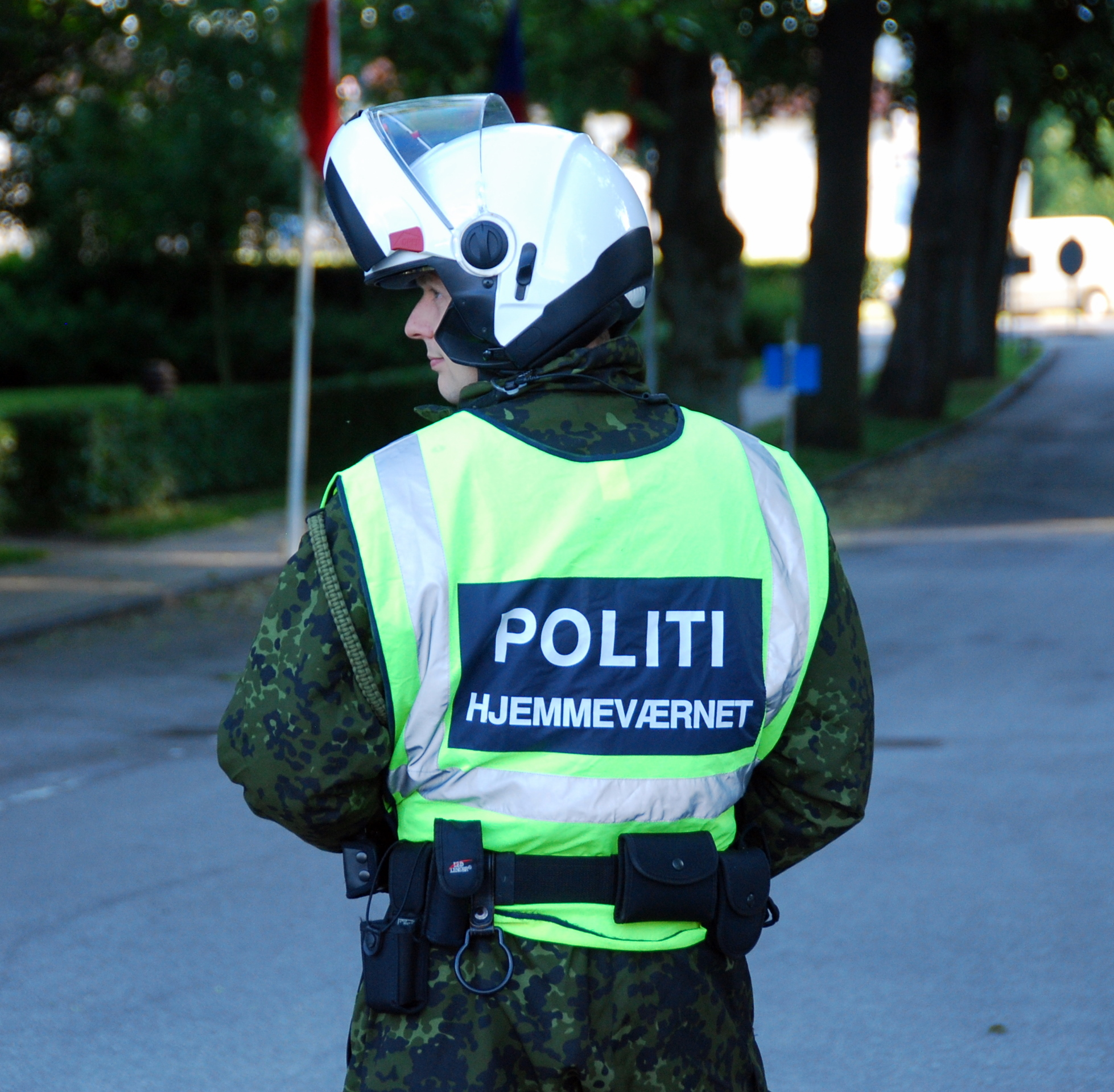 MC betjent fra Politihjemmeværnet. Her ved Borgvold i Viborg.